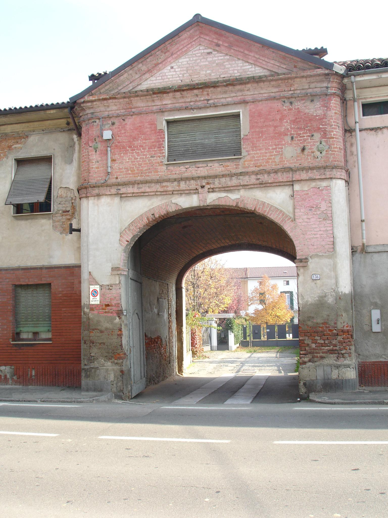 "Ingresso trionfale" di un gruppo di cascine situate nel centro abitato di Cantalupo.